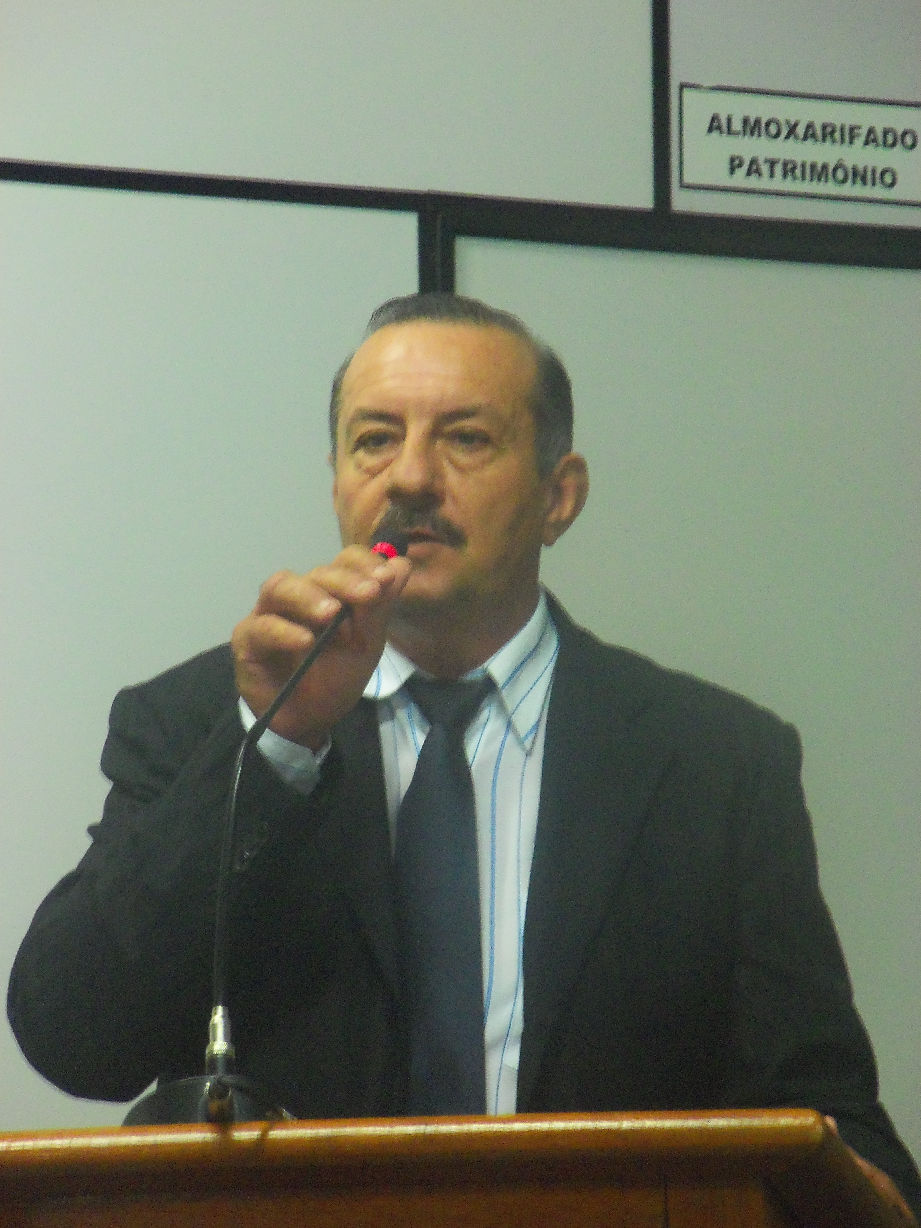 Vereador Luiz Carlos Scaquetti, de Fundão (Espírito Santo).